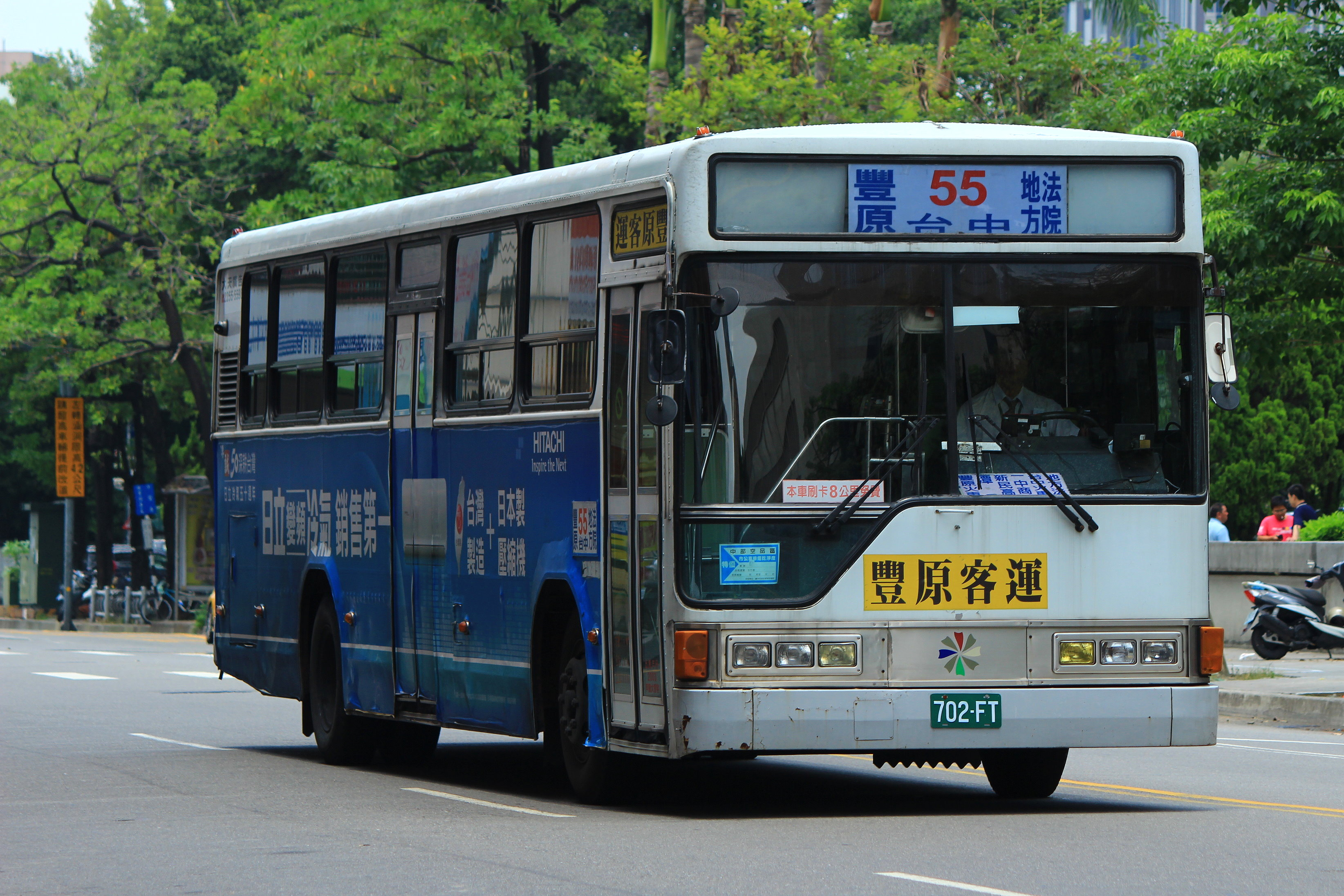 2003(2011) Hino ERK2JML (豐榮)